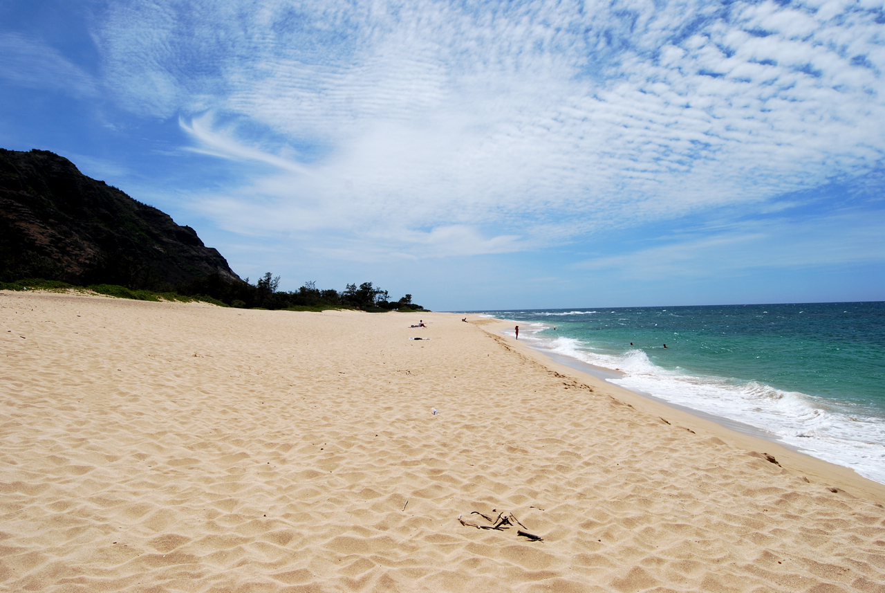 Ka'ena Point, Oahu